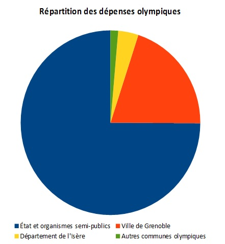 Diagramme présentant la répartition des dépenses entre les différents partenaires de l'organisation des Jeux olympiques d'hiver de Grenoble 1968.